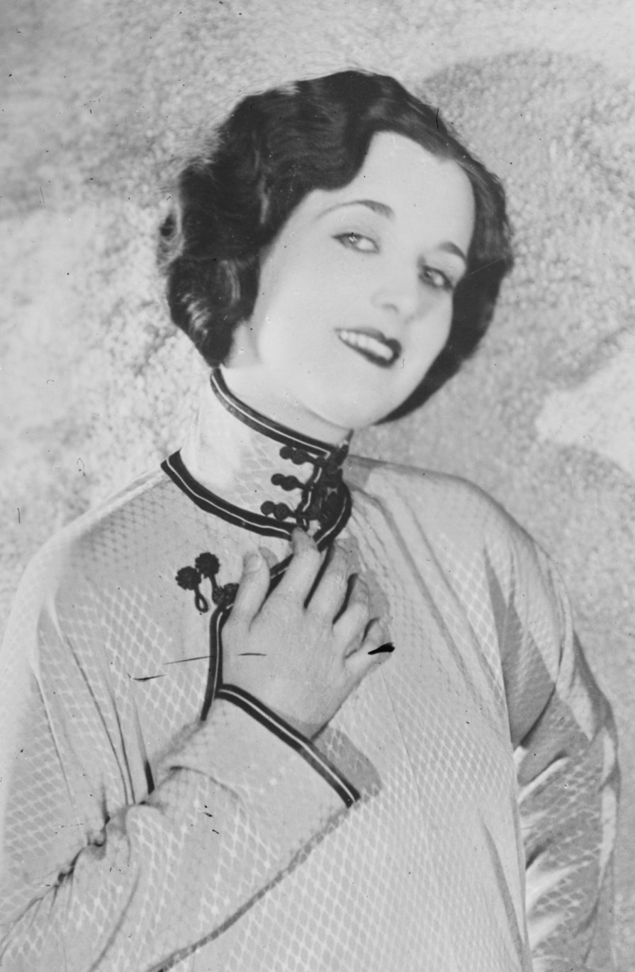 Actress Gertrude Olmstead